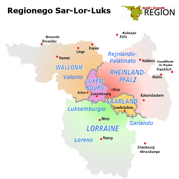 Mapo de la Regionego Sar-Lor-Luks (Sarlando-Loreno-Luksemburgio), priskribo en Esperanto